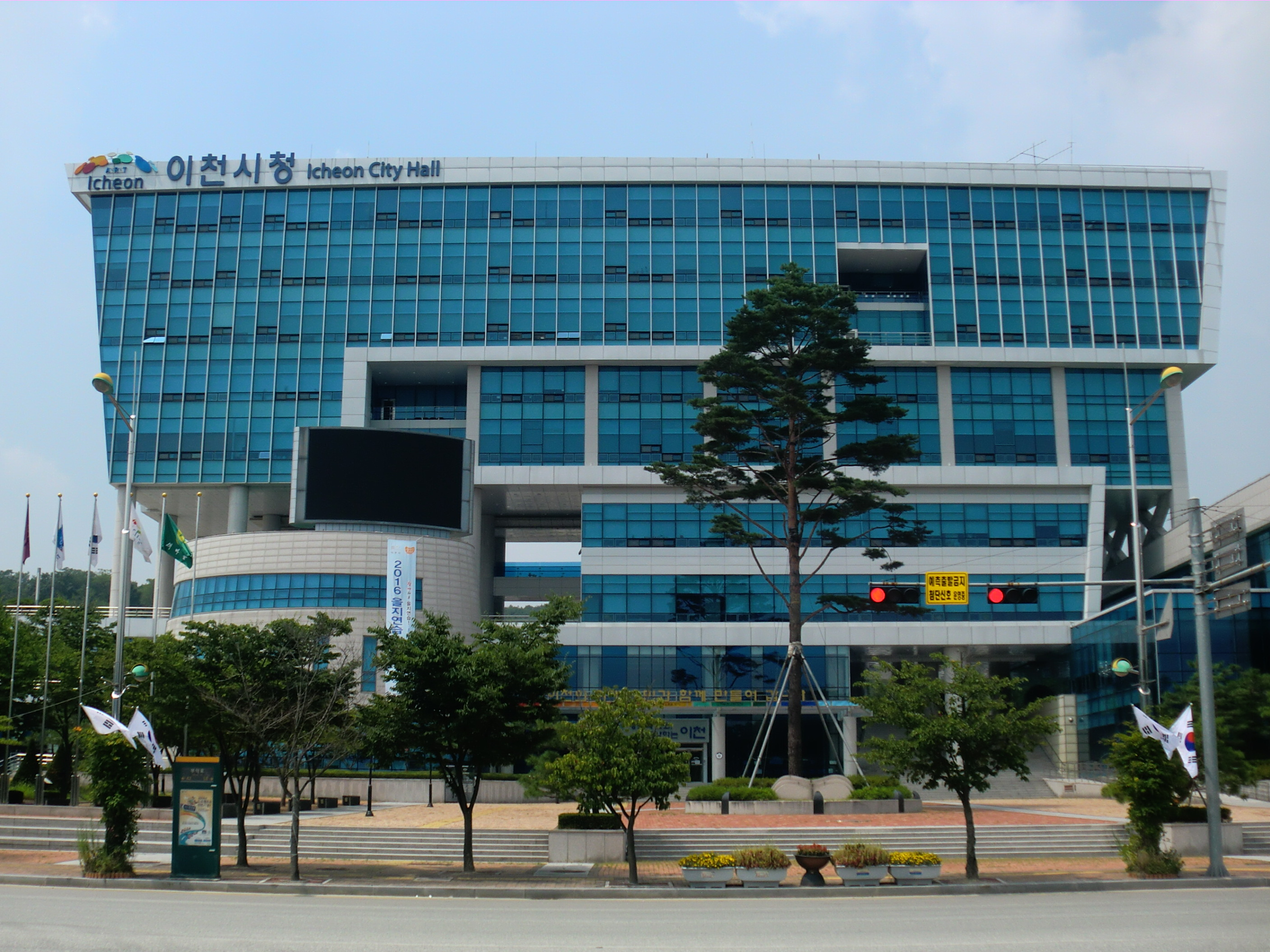 경기도 이천시에 있는 이천시청